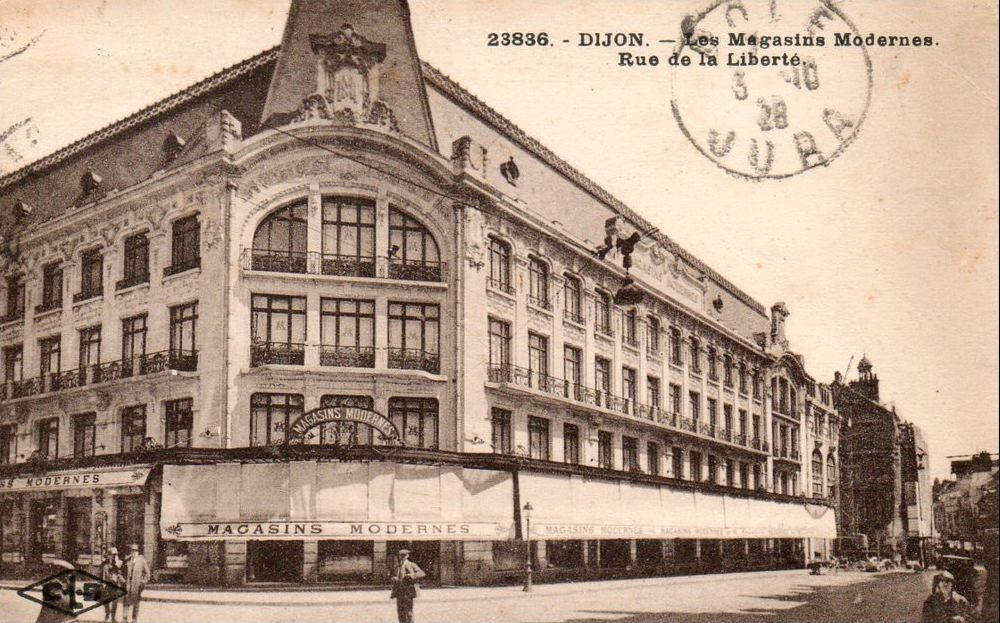 ancien grand magasin Les magasins modernes